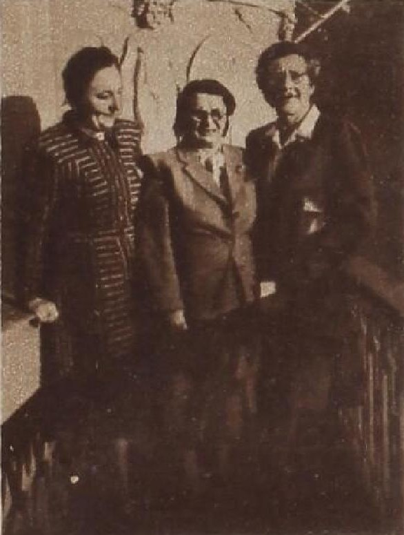 poslankyně Marie Trojanová (vlevo), místopředsedkyně ÚNS M. Hodinová (uprostřed) a předsedkyně Rady čs. žen Dr. M. Horáková na zasedání Mezinárodní federace žen ve Švédsku (říjen 1947)